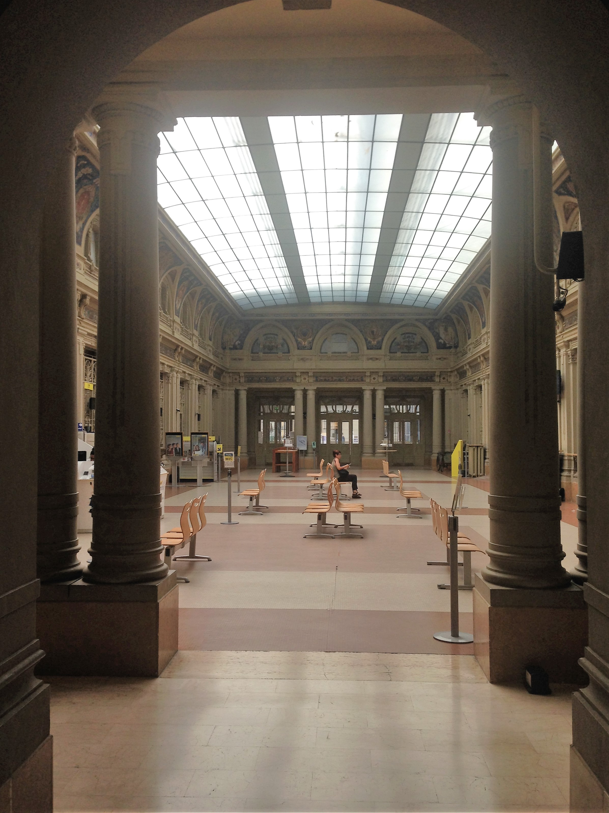 Parma Post Office interior